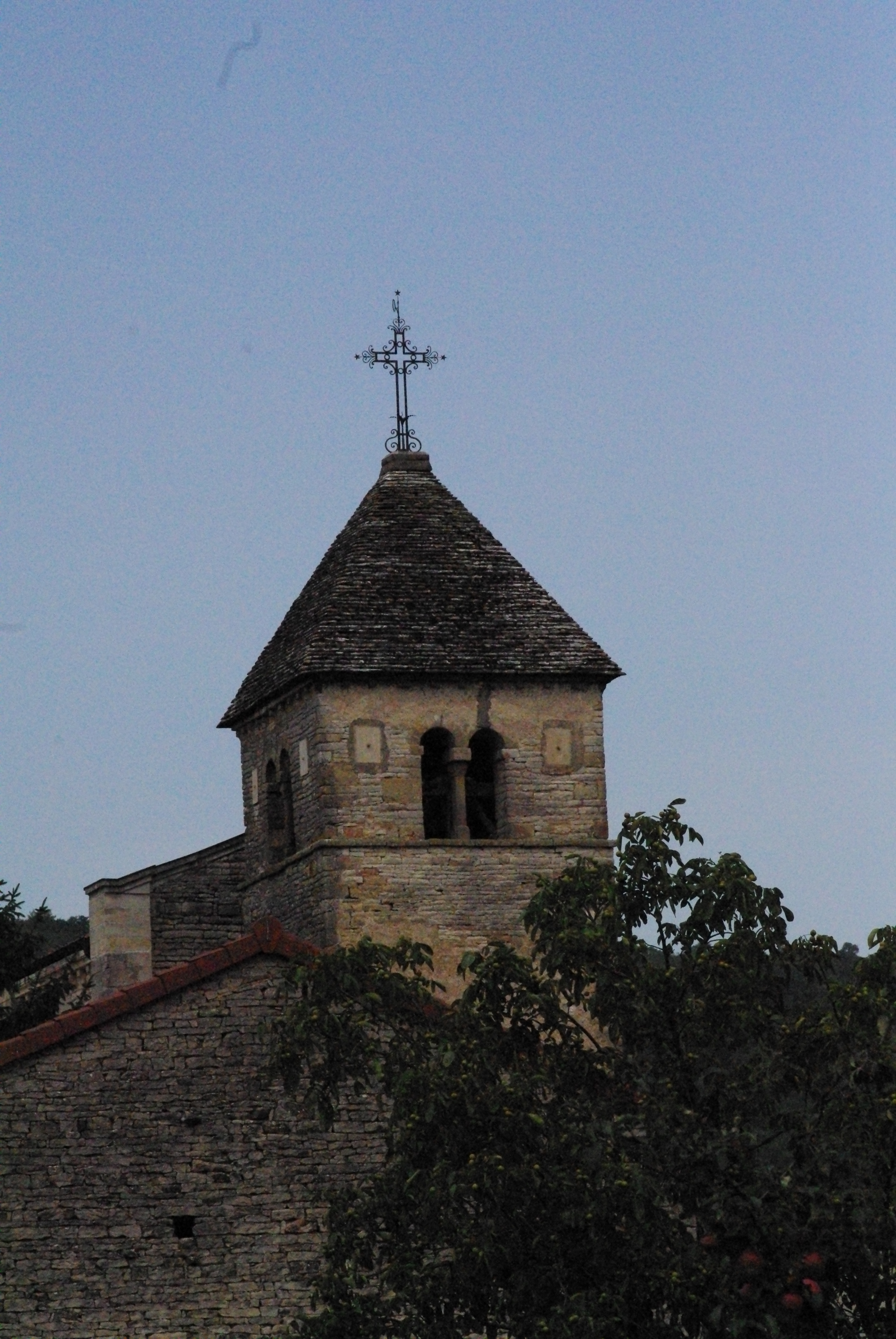 Clocher de l'église de Saint-Gengoux-de-Scissé